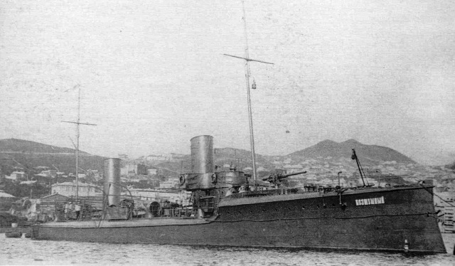 Эскадренный миноносец «Бесшумный».